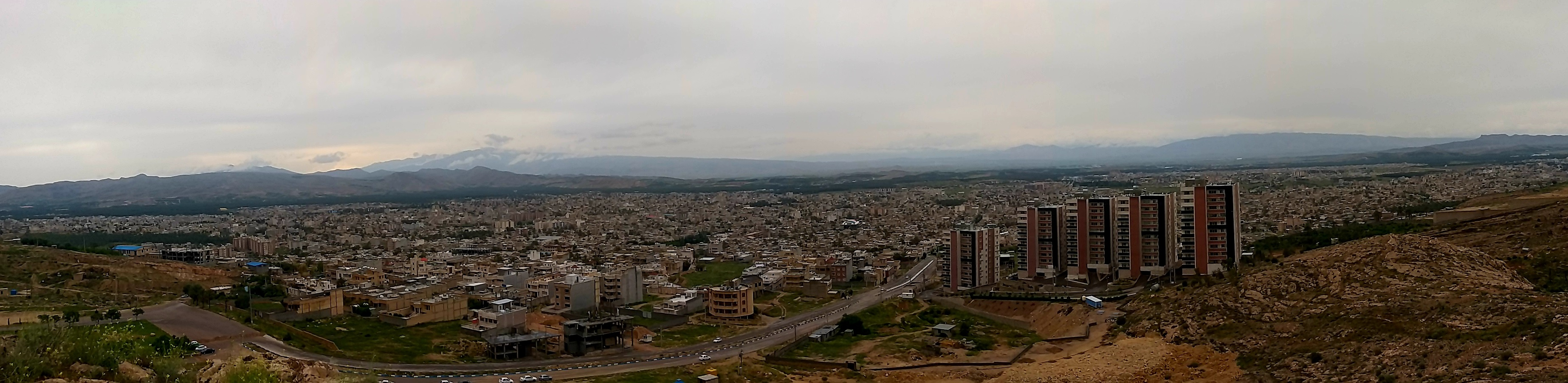 سراسرنمایی از جهرم